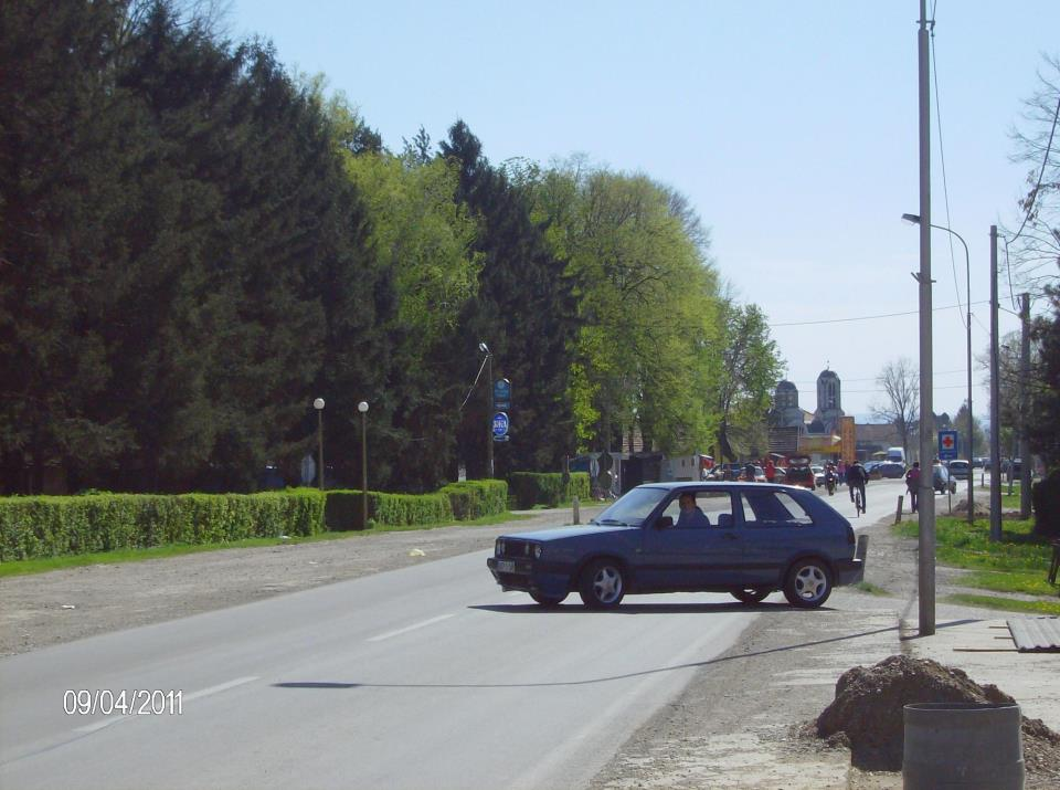 Поглед према цркви од бање Дворови